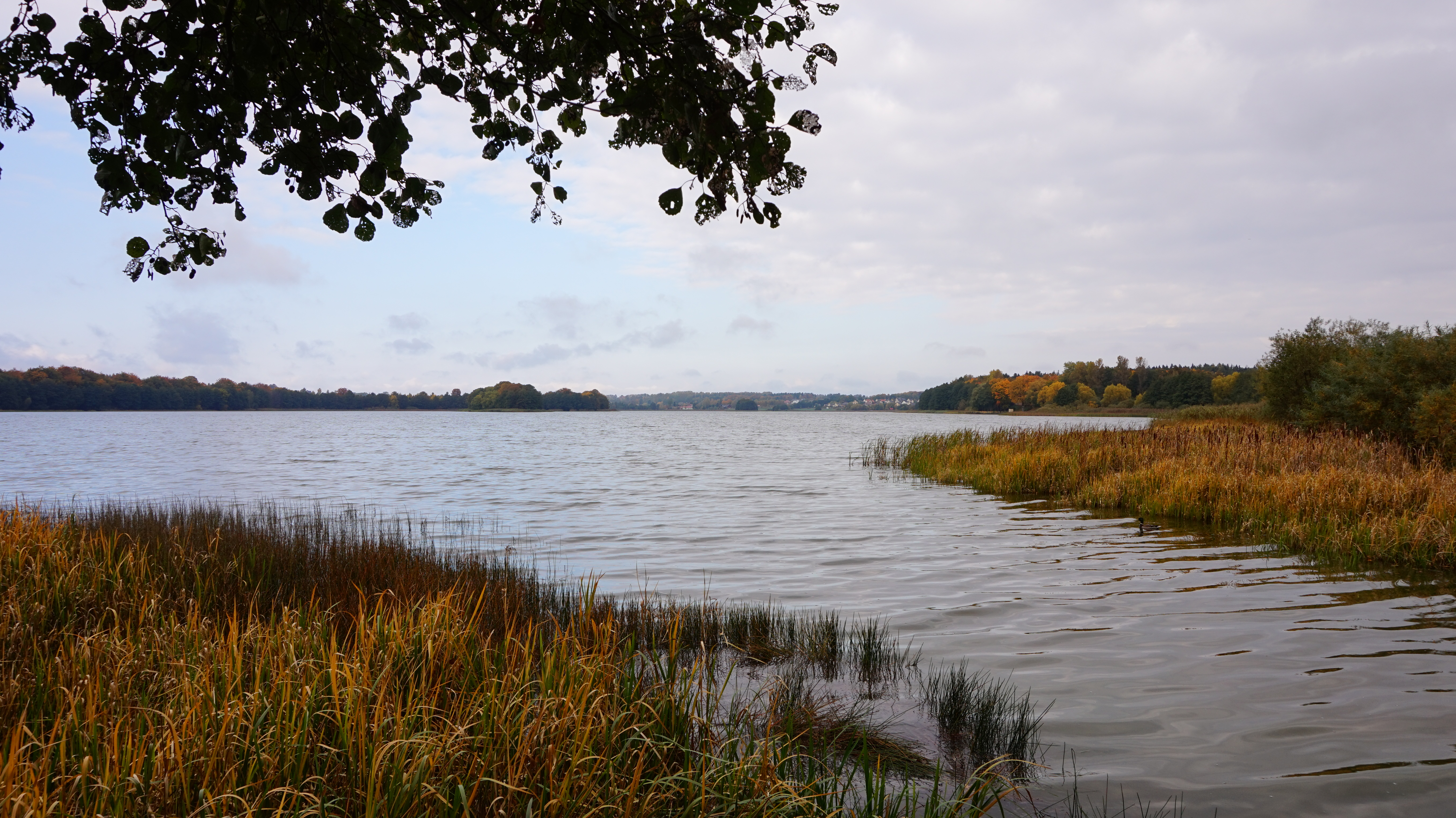 Tuchom - jezioro na Pojezierzu Kaszubskim.